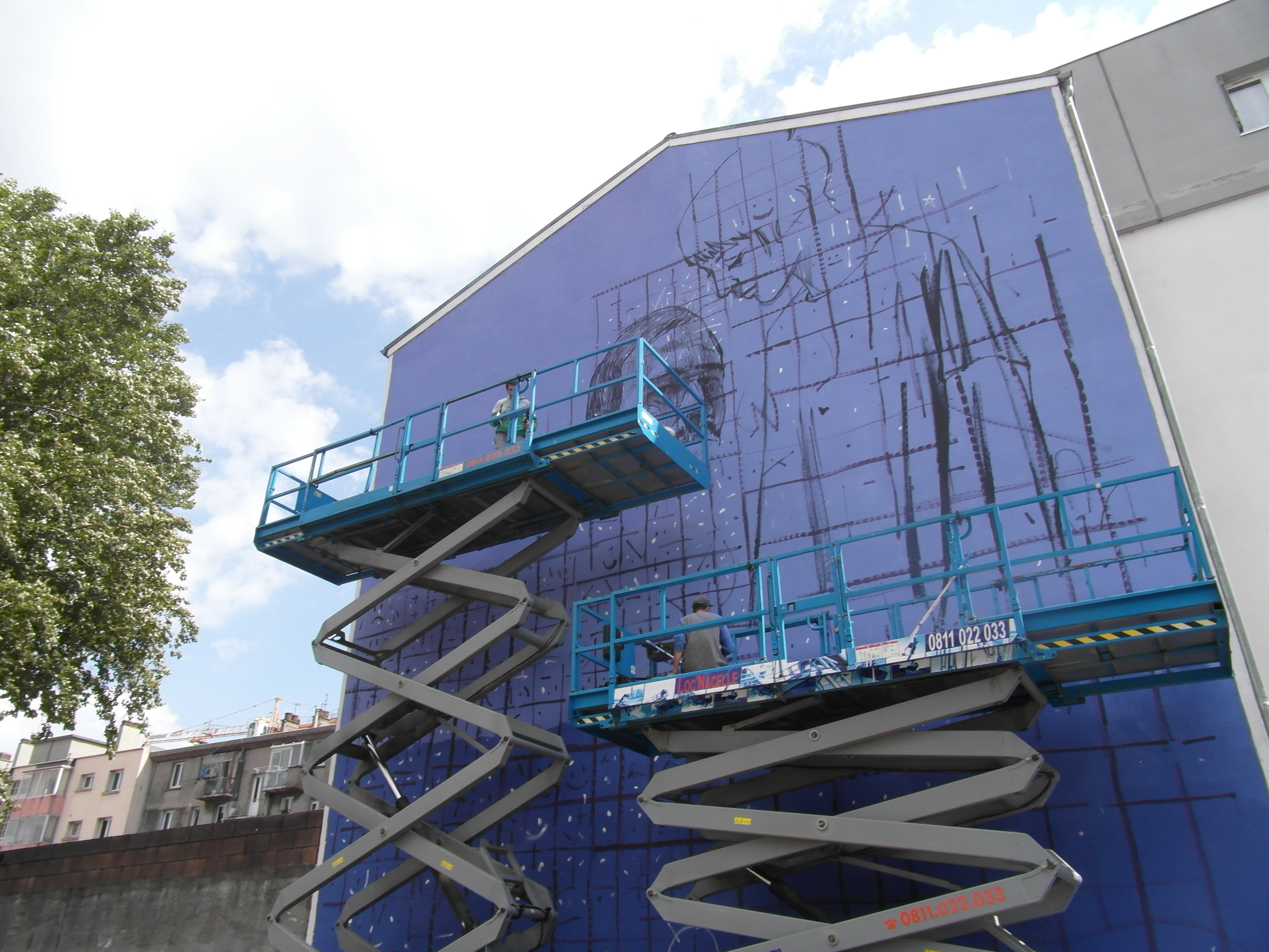 Fresque en cours de réalisation à Fontaine (Festival GSAF 2018)